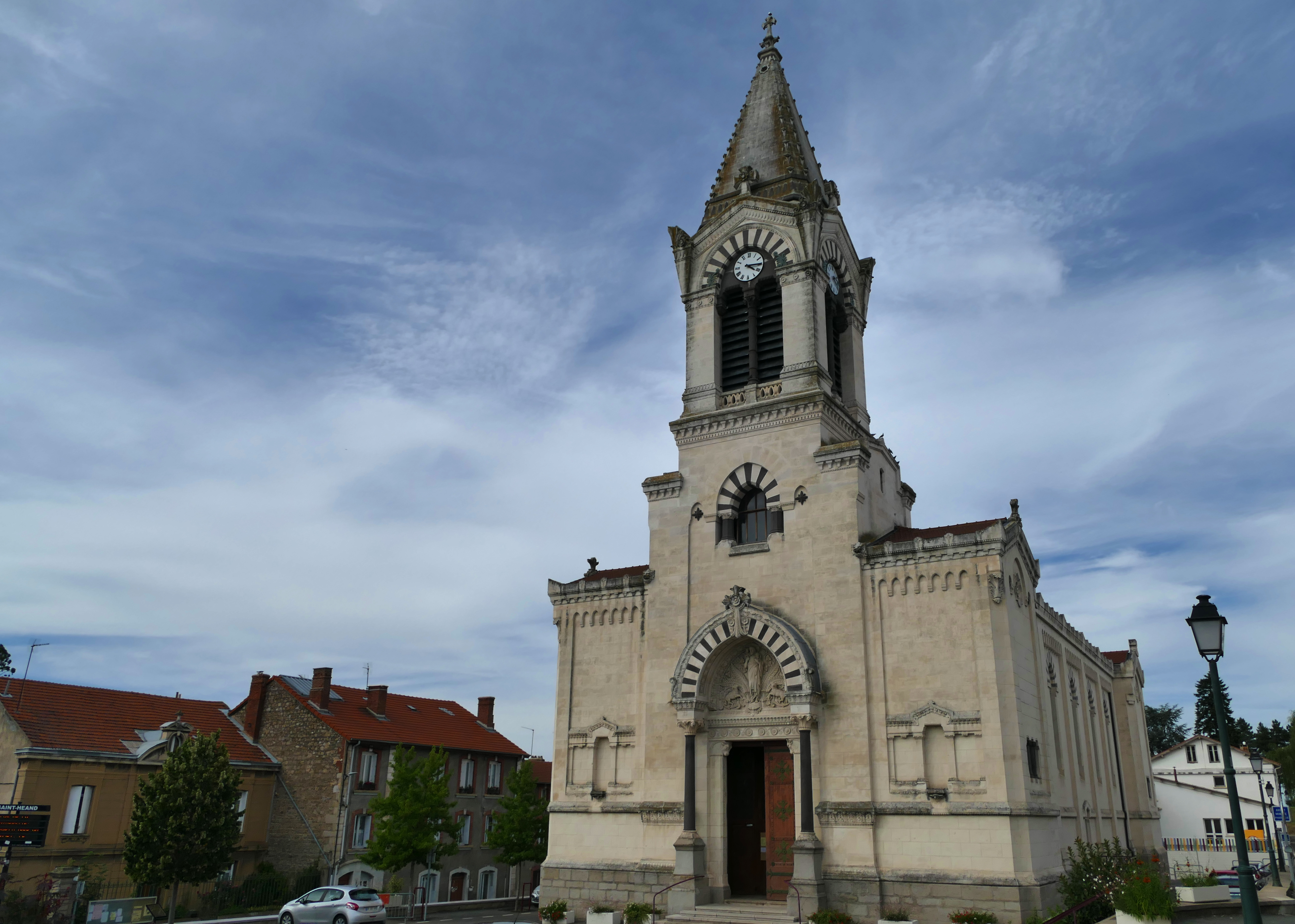 Église Saint-Médard de Saint-Héand